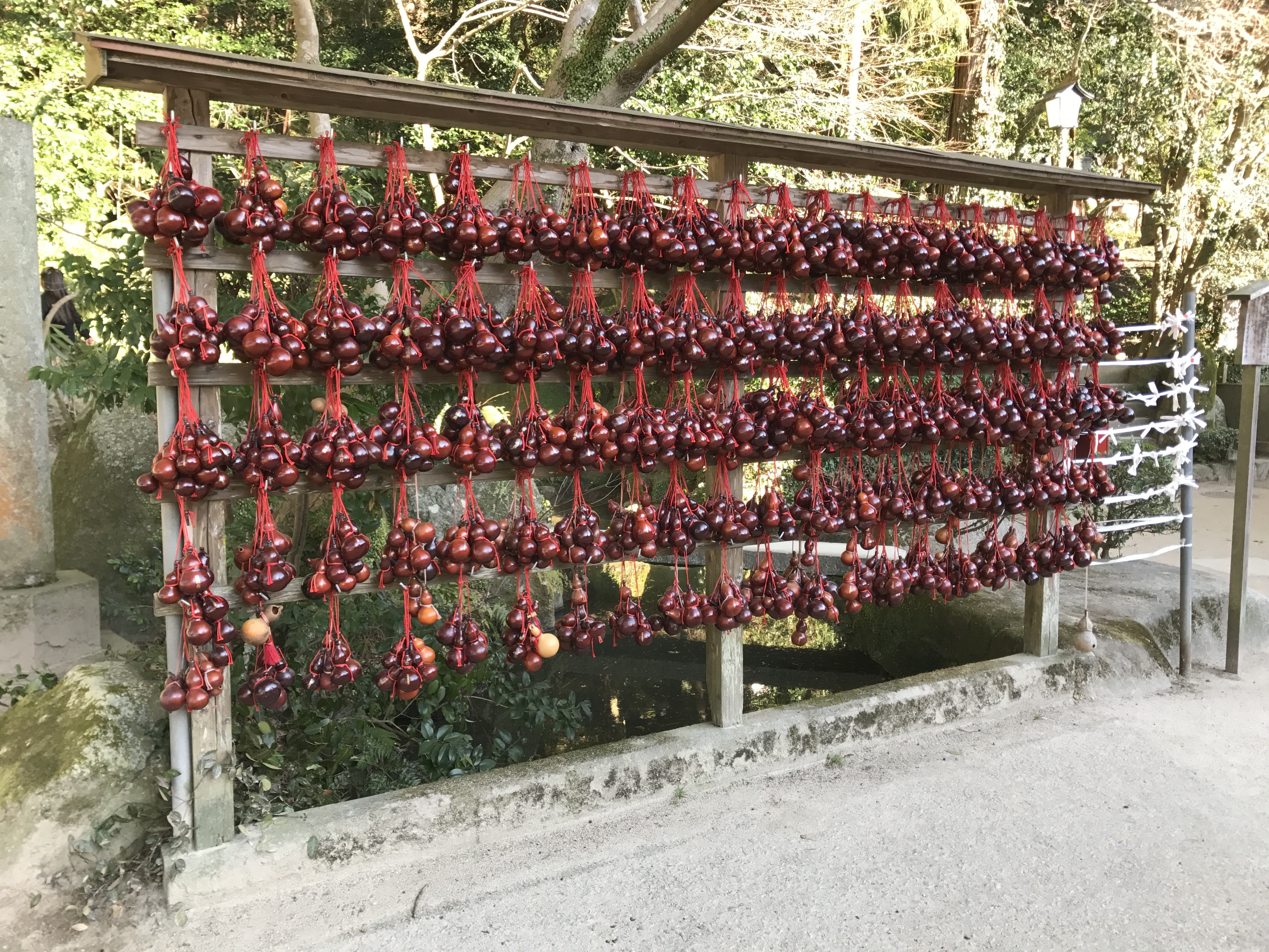 太宰府天満宮の瓢箪棚